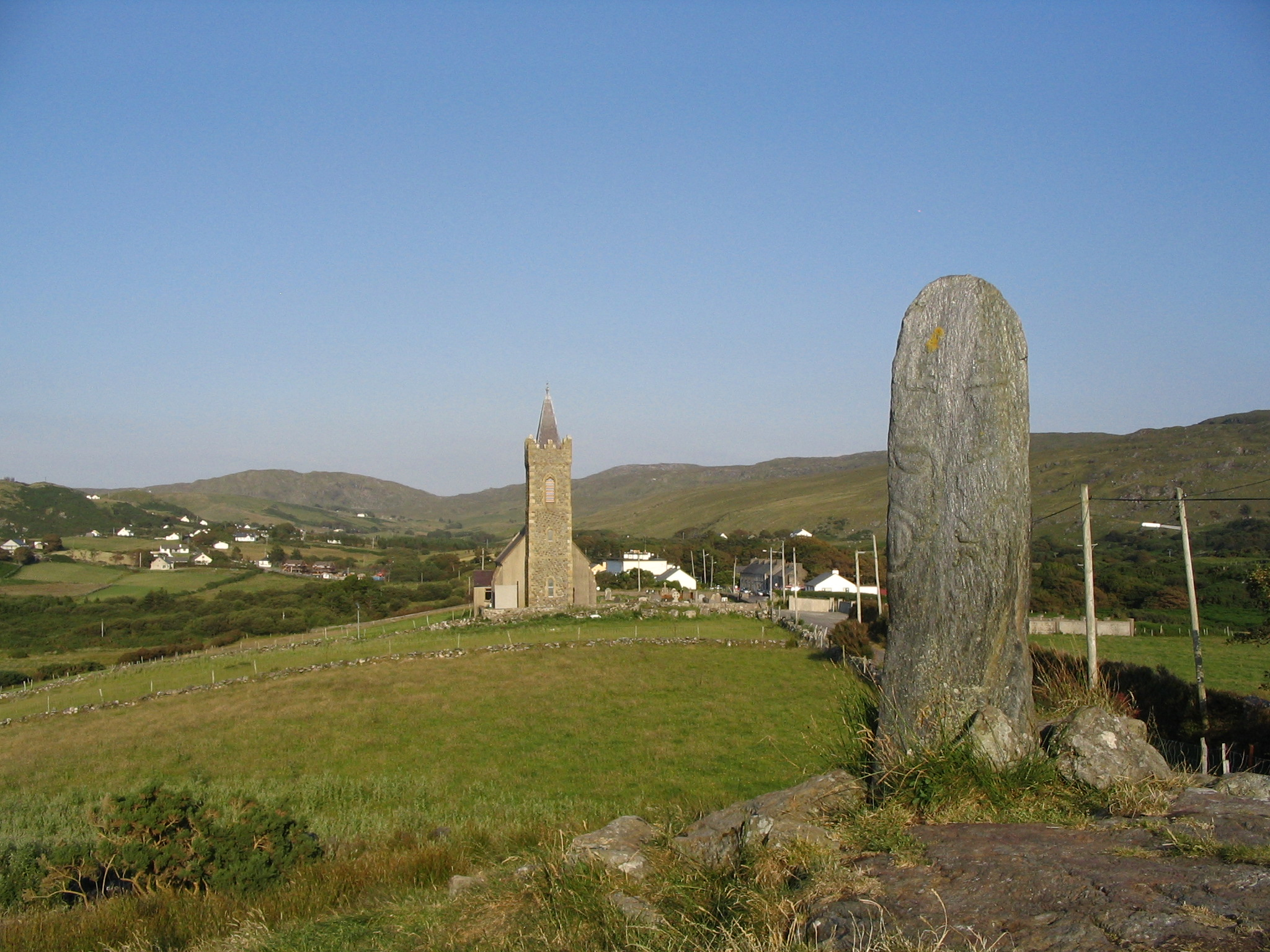 Glencolumbkille: An turas standing stone.